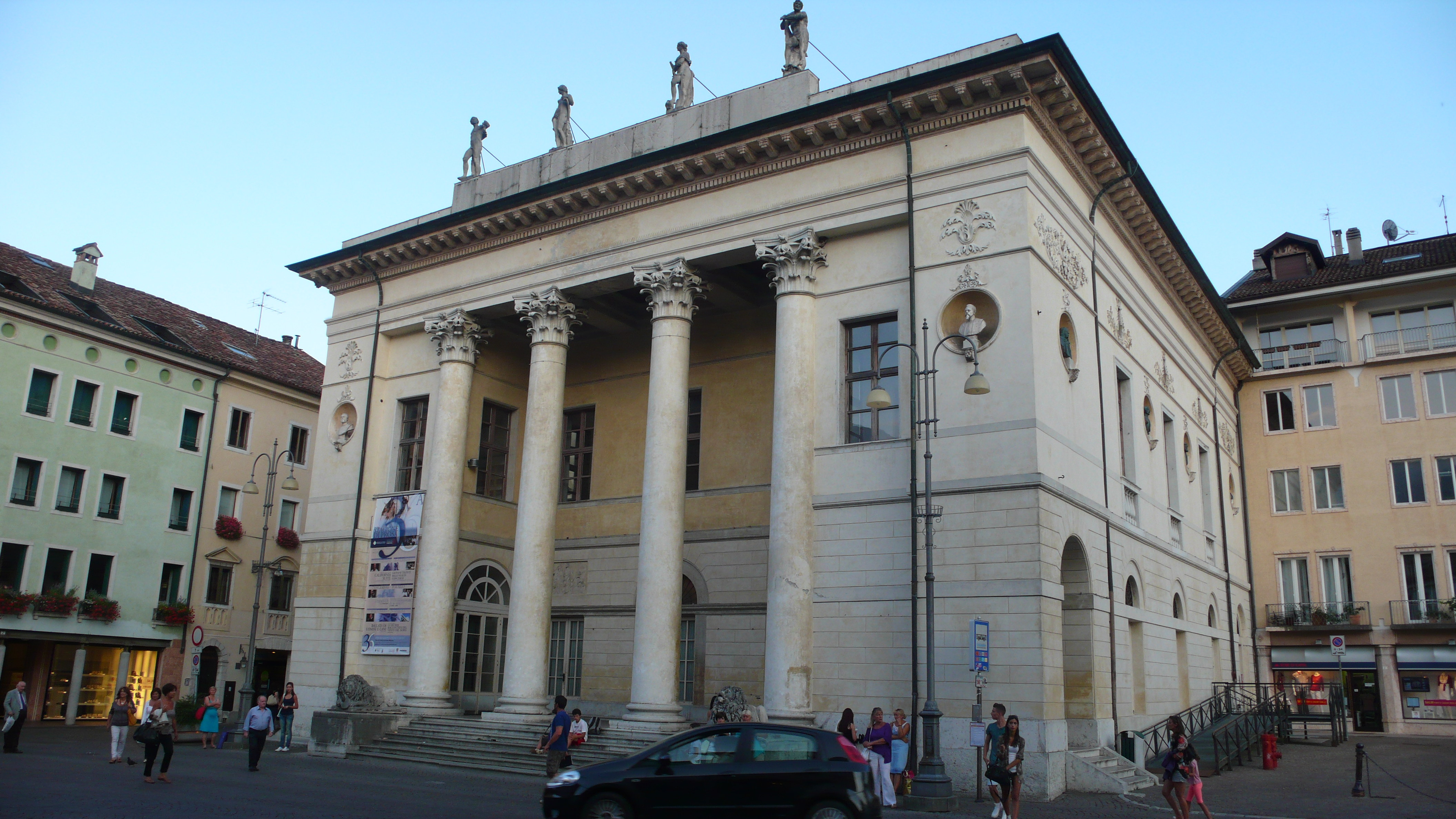 Teatro Comunale This is a photo of a monument which is part of cultural heritage of Italy.